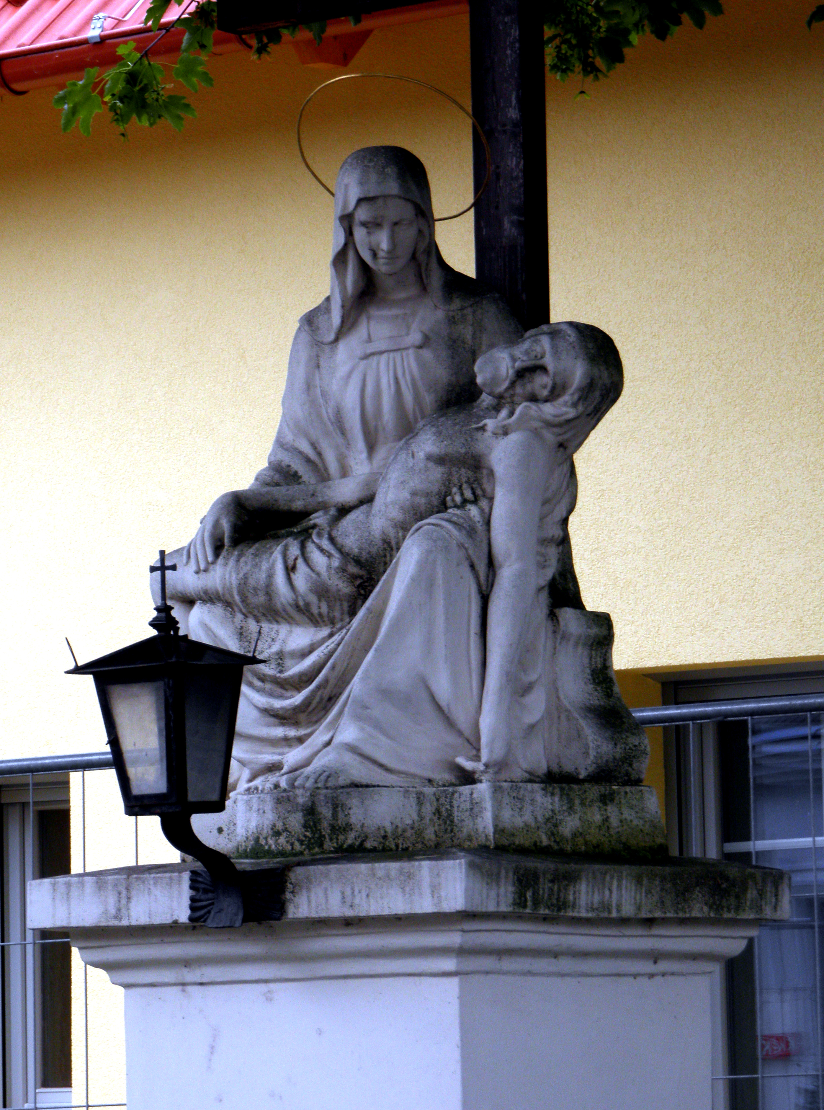 Pieta